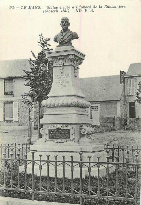 Statue d'Edouard Prudhomme de La Boussinière au Mans. Scan du 13 avril 2020